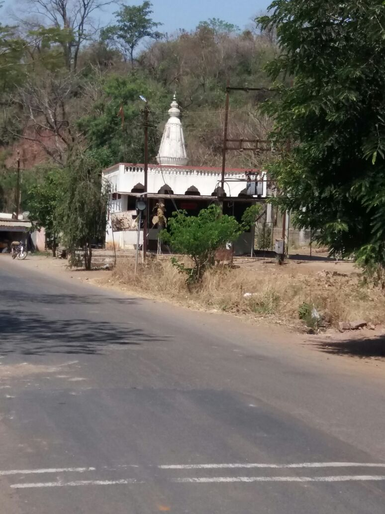 प्रवेशद्वार